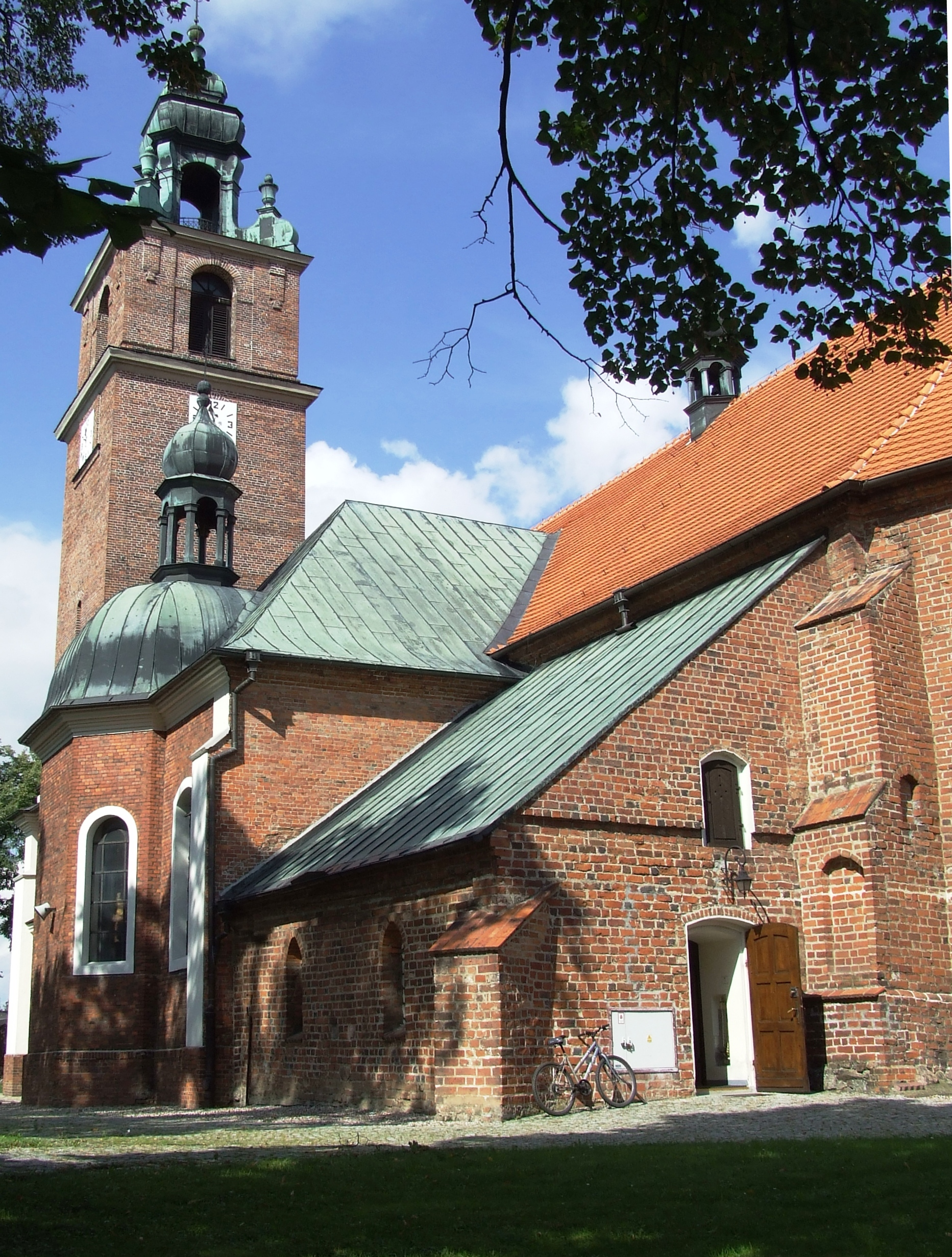 Kłecko, ul. Kościelna 1 - kościół parafialny pw. św. Jadwigi, po 1510, 1781, 1930 r.